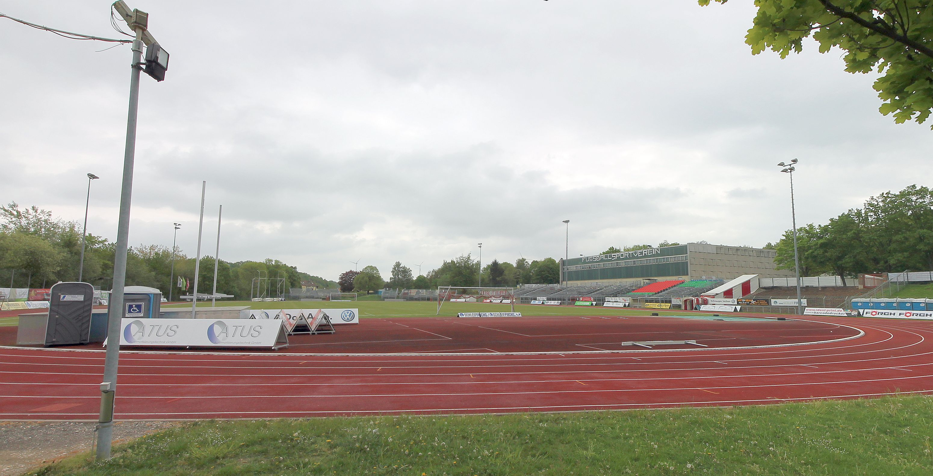 Sportforum "Sojus 31" in Zwickau-Eckersbach (E4). Zwickau, Sachsen, Deutschland.